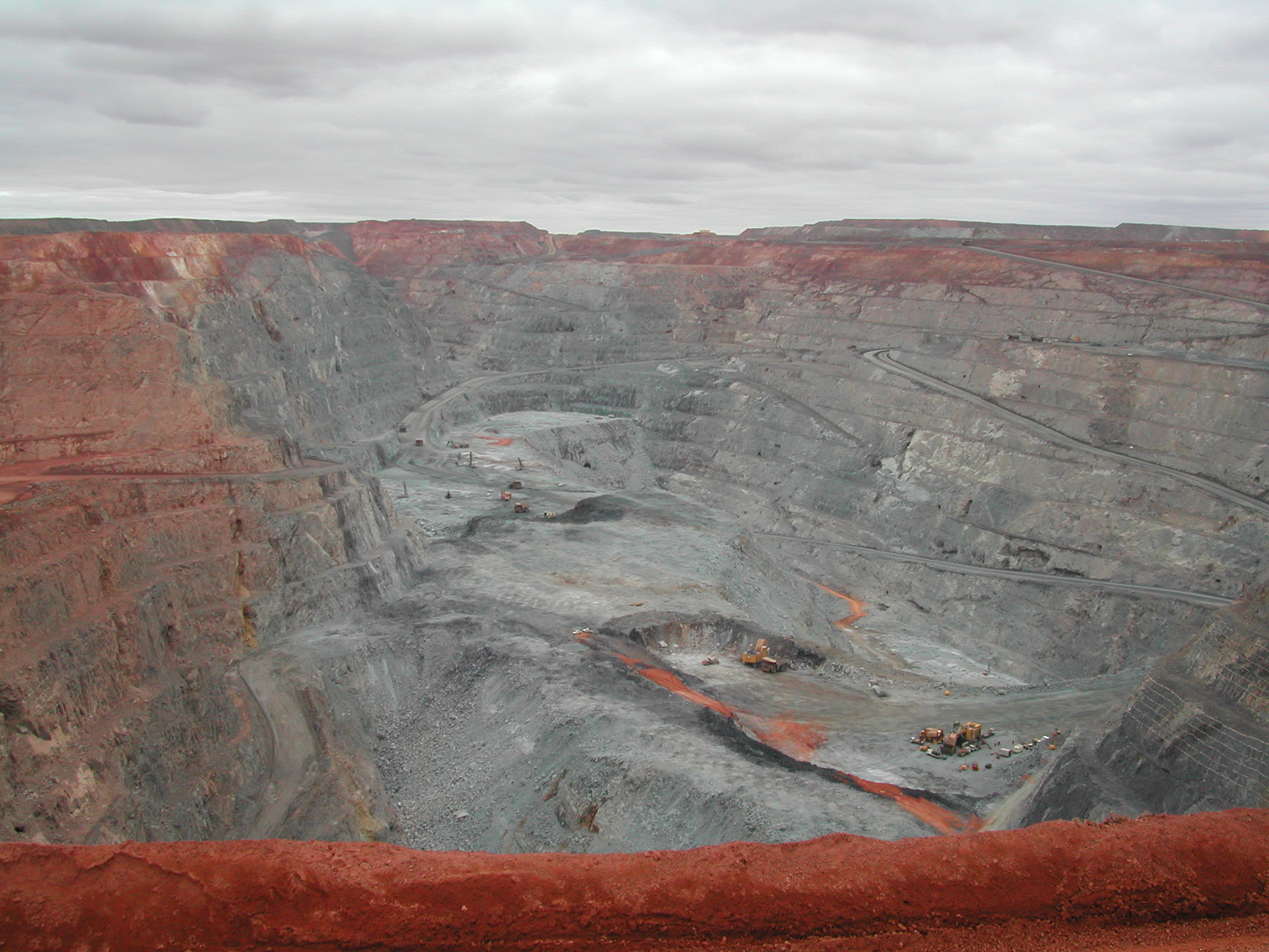 Goldmine als Tagebaubergwerk in Westaustralien, Superpit